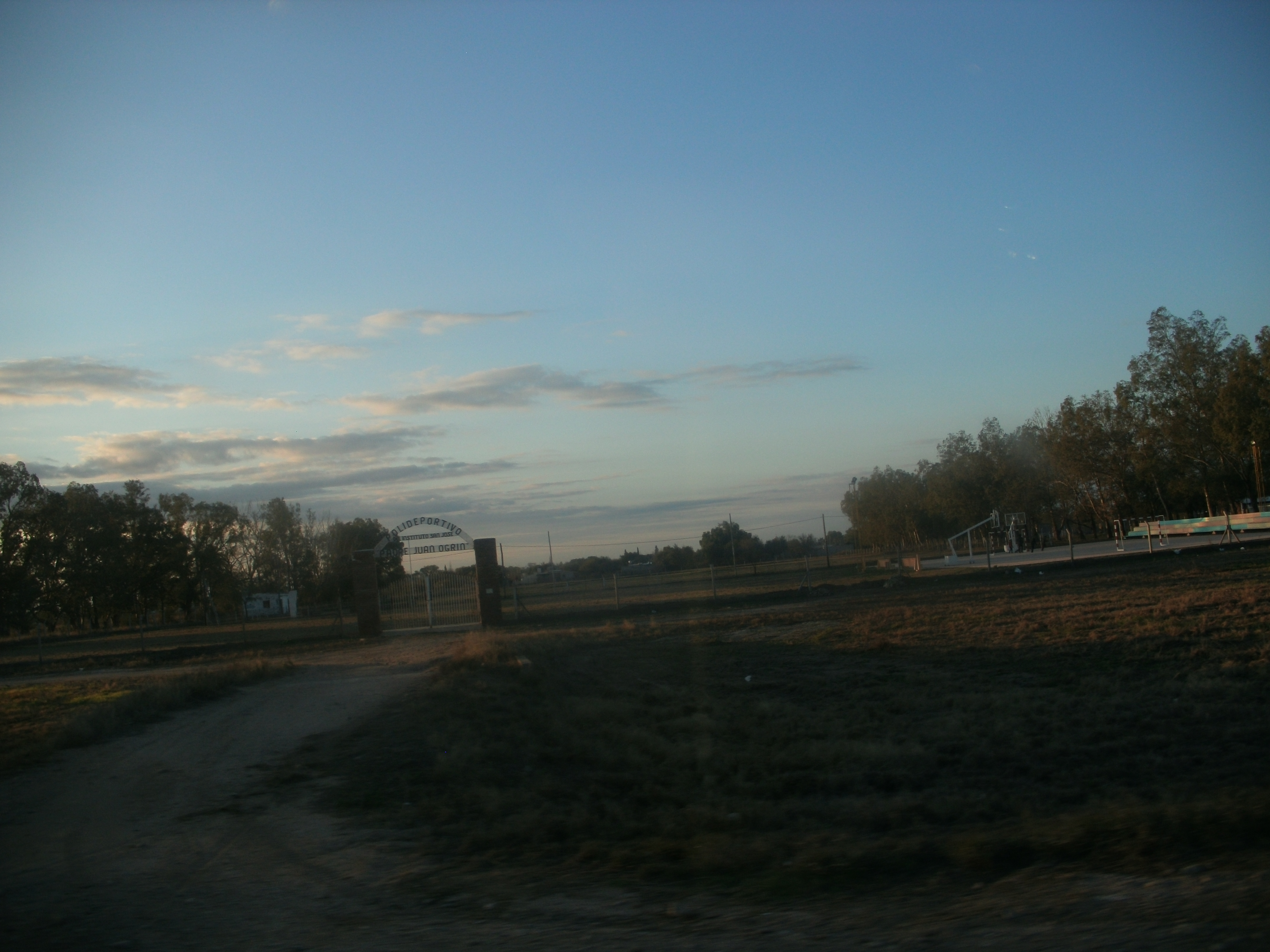 COMPLEJO RECREATIVO